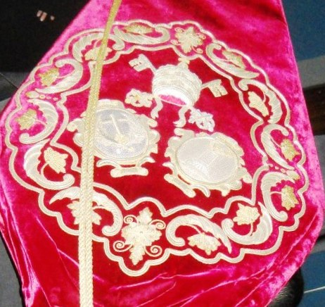 Escudo que aparece en el bacalao de la Hermandad